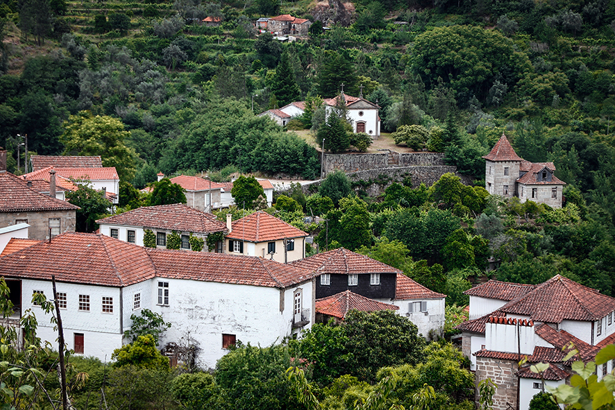 Aldeia de Pias, Cinfães